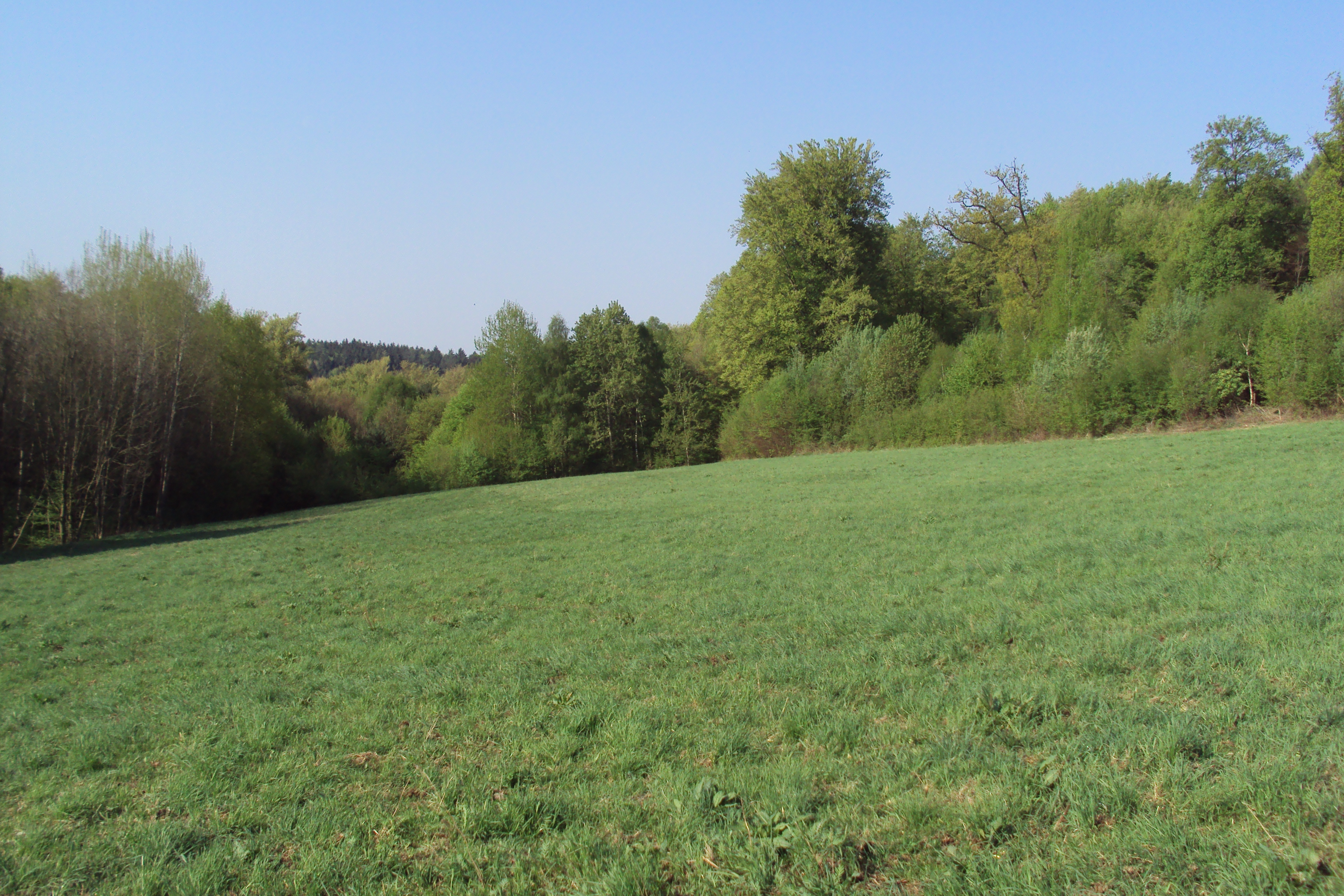 Okraj přírodní památky od Osinalického sedla, katastr Zakšín